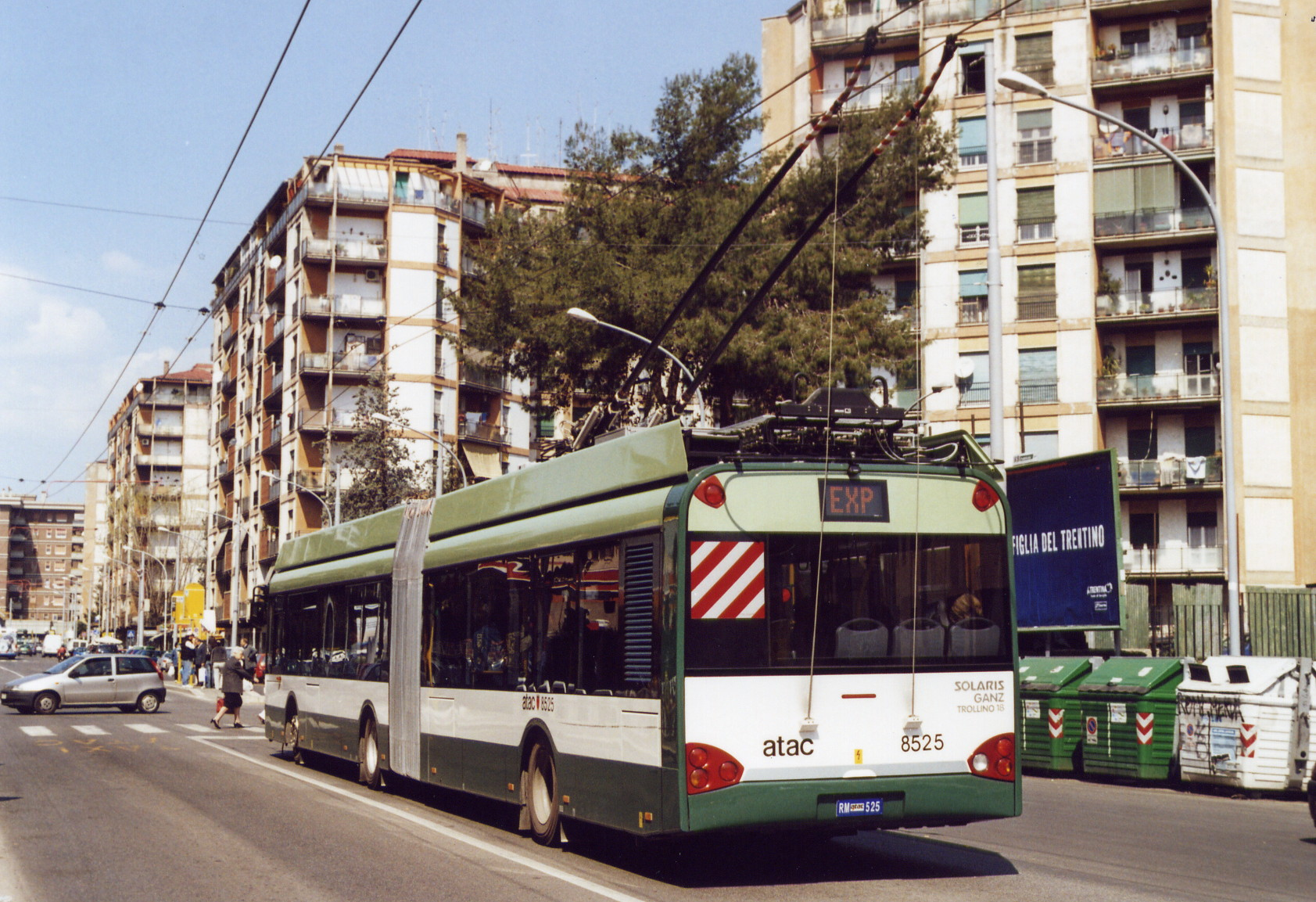 5 luglio 2012